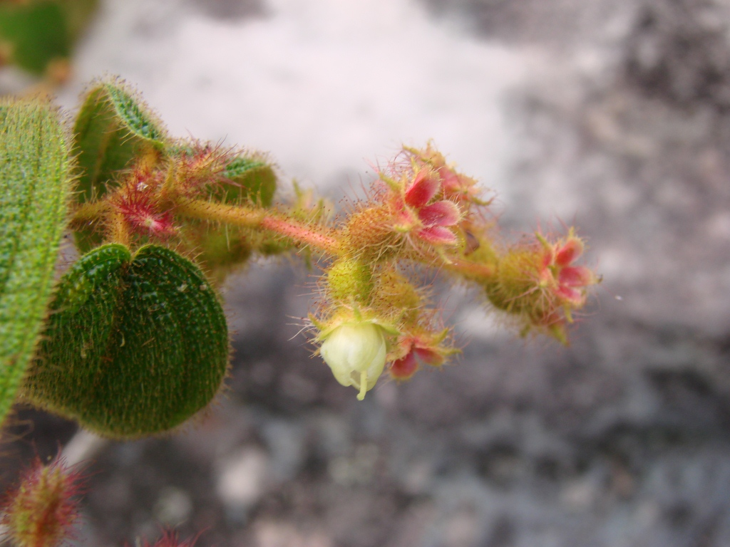 Clidemia capitellata (Bonpl.) D. - MELASTOMATACEAE - Chapada Diamantina - Parque Natural Municipal Morro do Pai Inácio - Palmeiras - Bahia - Brasil.